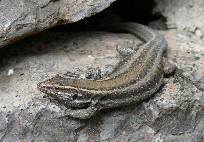 Gallotia caesaris (female) (Lehrs, 1914) subsp. gomerae (Boettger & Müller, 1914).